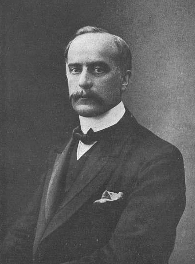 Александр Александрович Миллер, ковенский губернский предводитель дворянства, камергер.